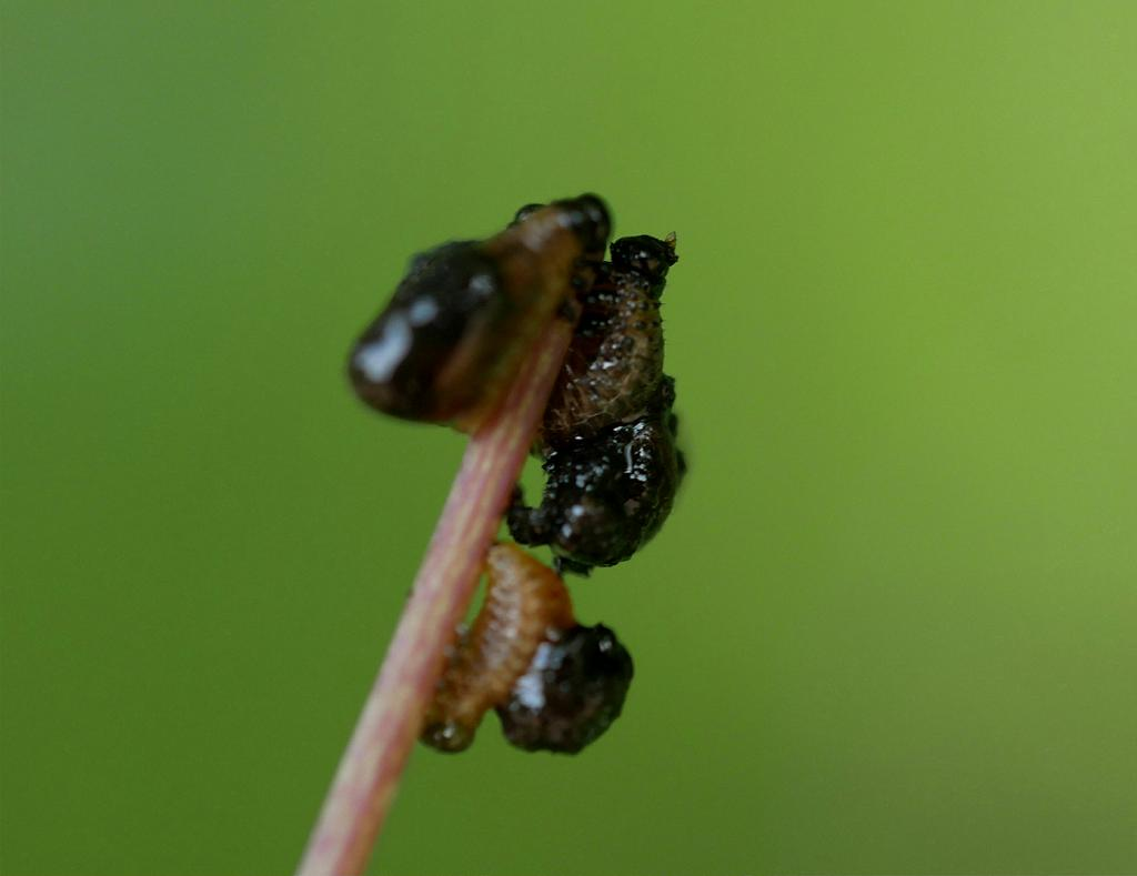 2019/06/13 和歌山県田辺市：Tanabe City. Wakayama Pref. Japan